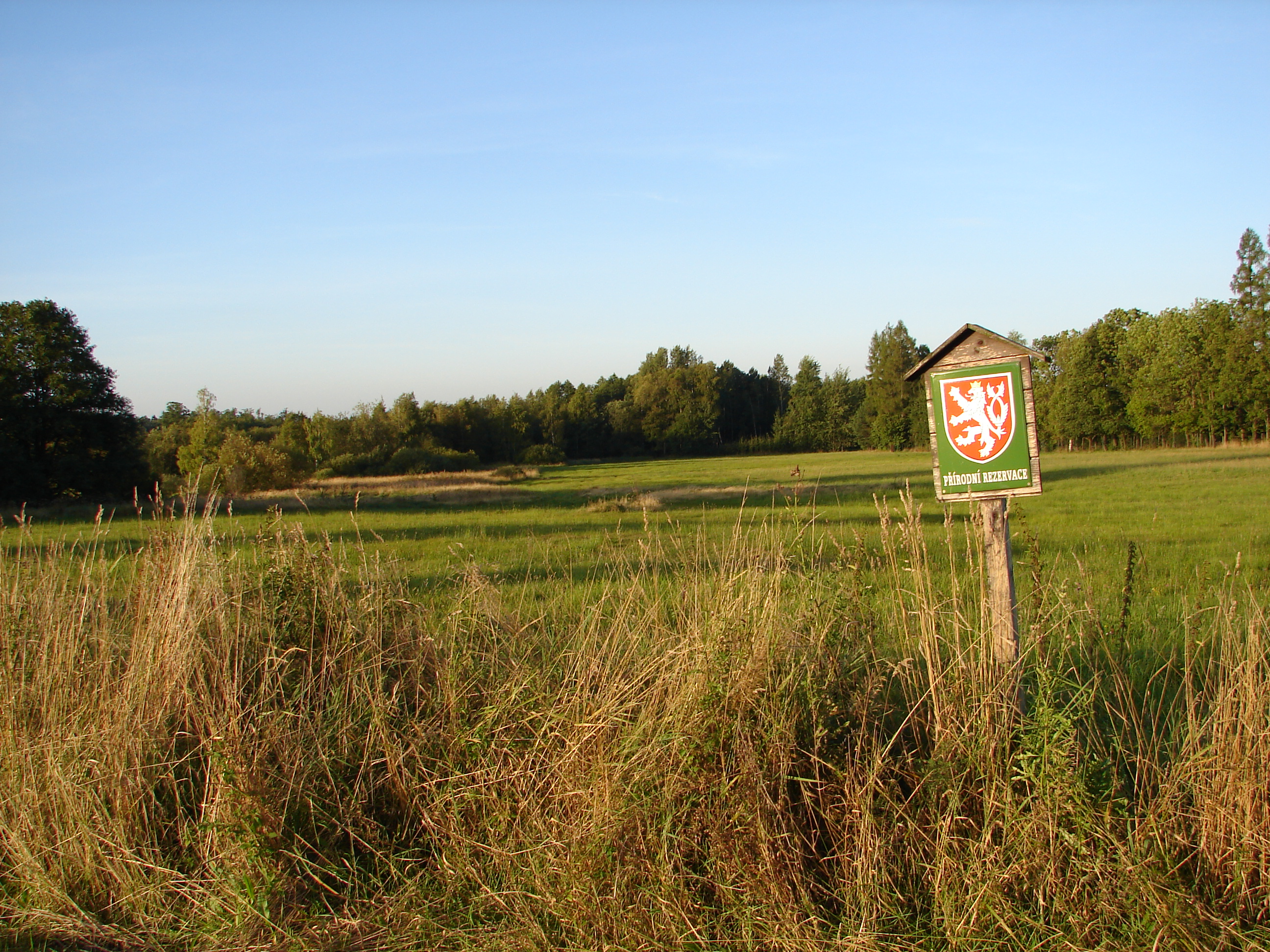 PP Rašeliniště Kaliště - hranice